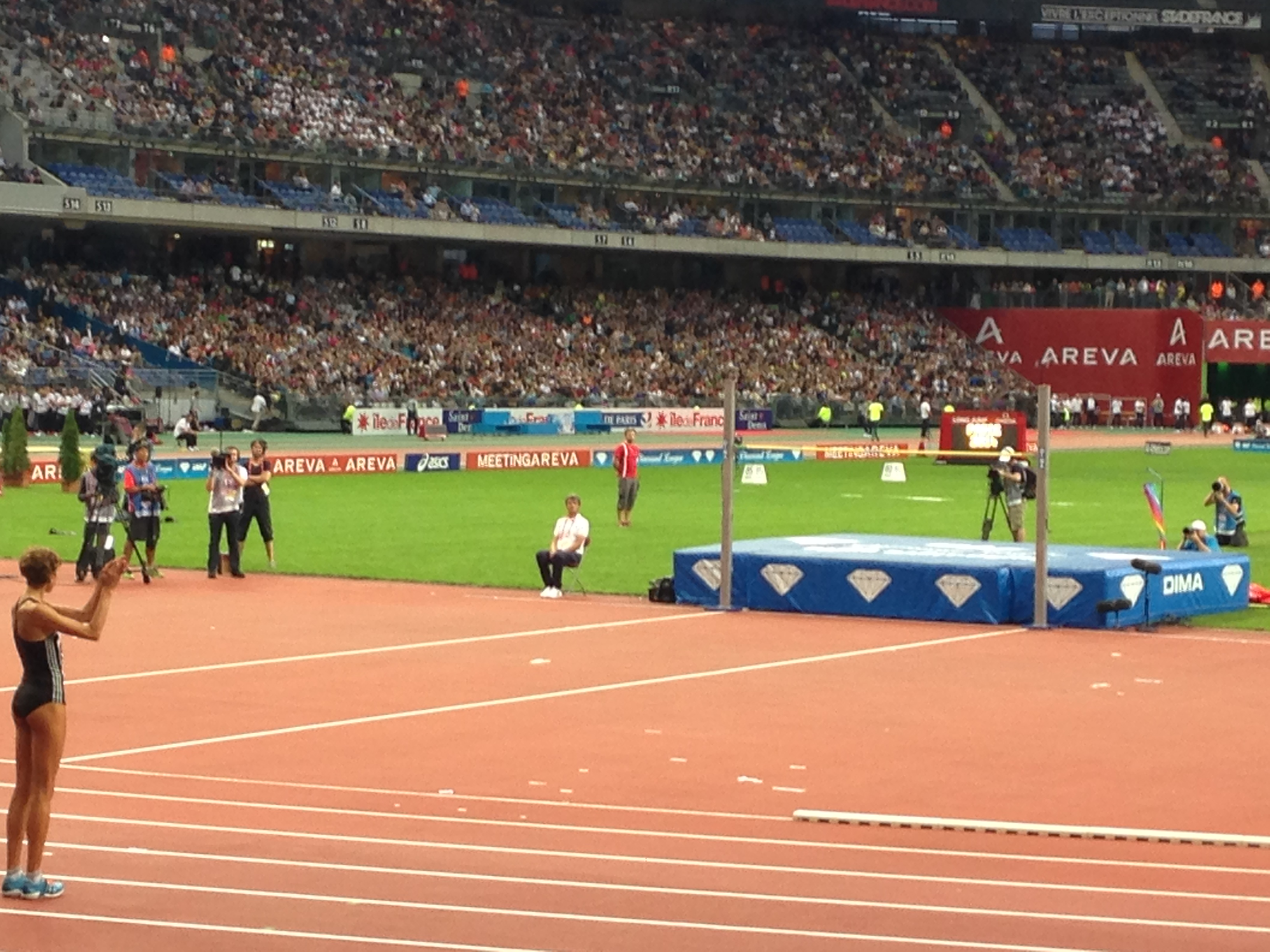 Blanka Vlašić prépare son élan au saut en hauteur au Stade de France en 2014